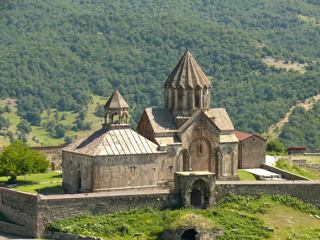 Գանձասարի Սուրբ Հովհաննես Մկրտիչ եկեղեցին կառուցվել է 1216 – 1238 թվականներին Հասան-Ջալալ իշխանի կողմից։ Գանձասարը 1400 – 1816 թվականներին Աղվանից կաթողիկոսների նստավայրն էր։ 6/148